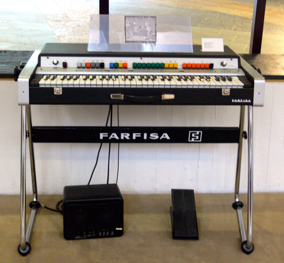 Elektronische Orgel Farfisa VIP 345, Ancona, nach 1970 Farfisa VIP 345 (circa 1970, Ancona, Italy)